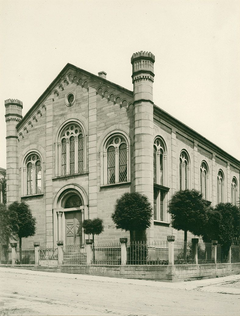 Neue Synagoge in Eppingen, ca. 1896, Foto und Text siehe bei Peter Rückert: Eppingen. In: Franz-Josef Ziwes (Hrsg.): Badische Synagogen aus der Zeit von Großherzog Friedrich I. in zeitgenössischen Photographien. G. Braun, Karlsruhe 1997, ISBN 3-7650-8177-9, S. 60–61